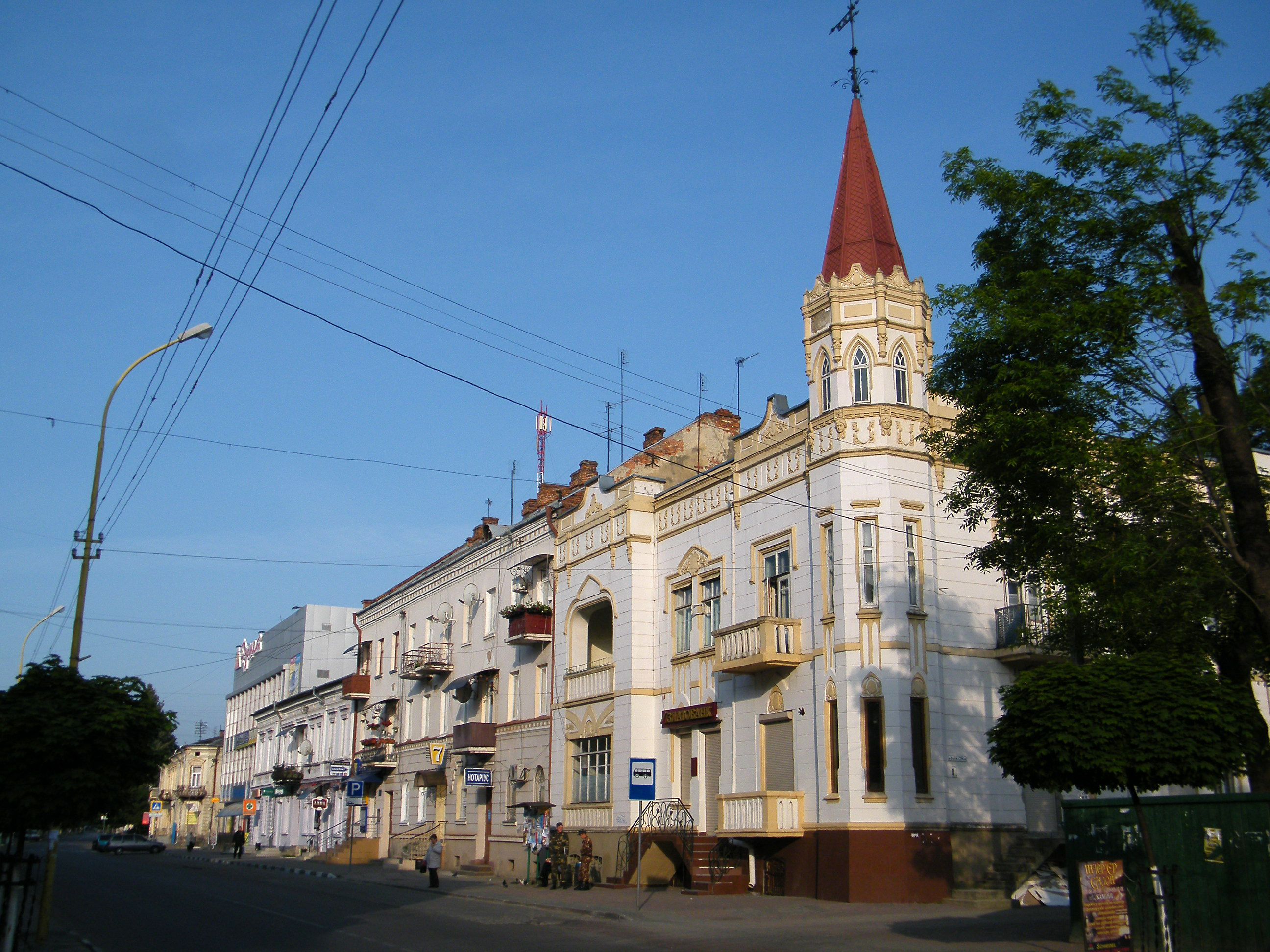 Вулиця Тараса Шевченка в Стрию